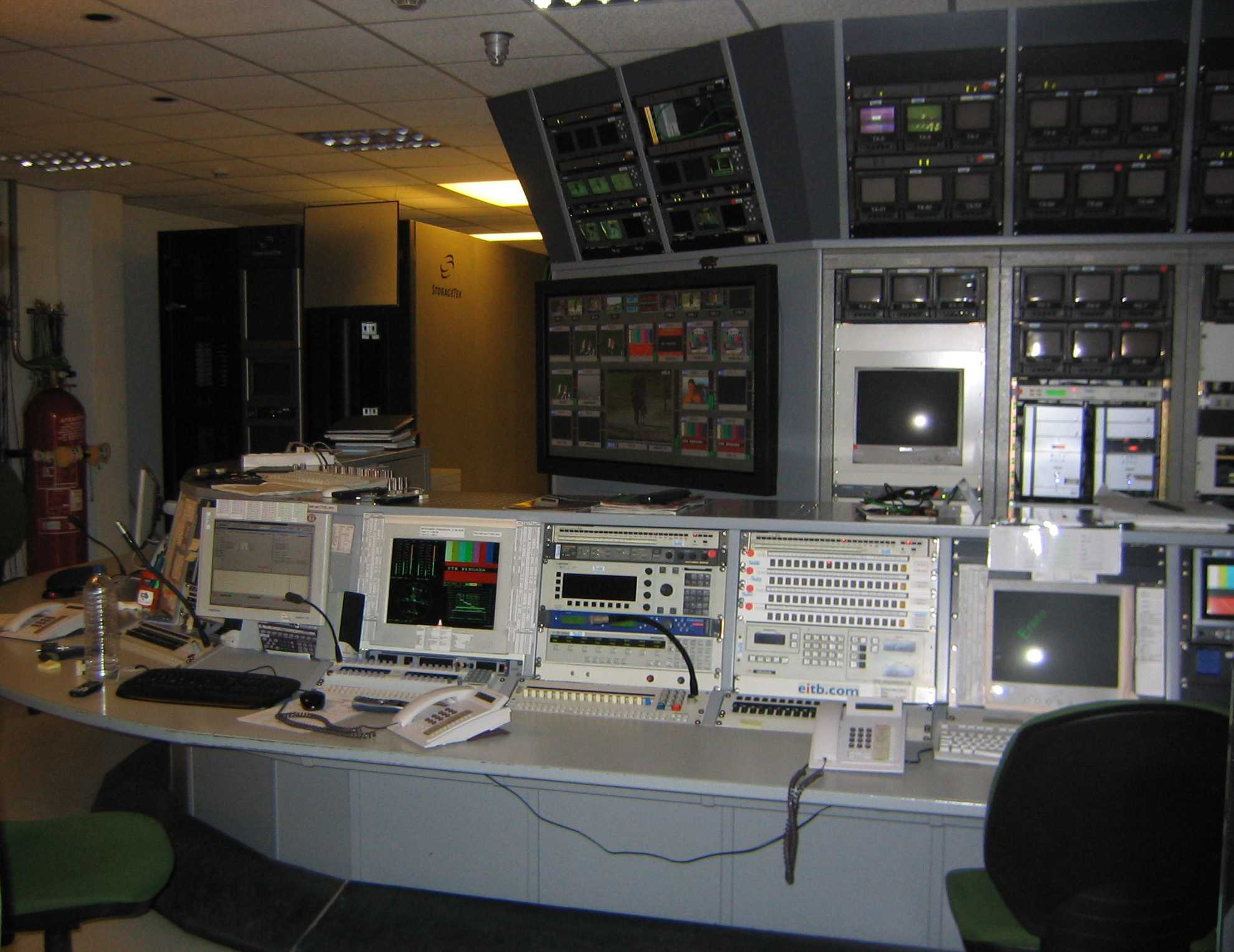 Área de control central de Euskal Telebista en Iurreta, Vizcaya, País Vasco, España.